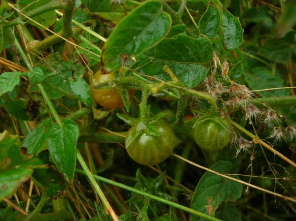 Fruit of Solanum pimpinellifolium